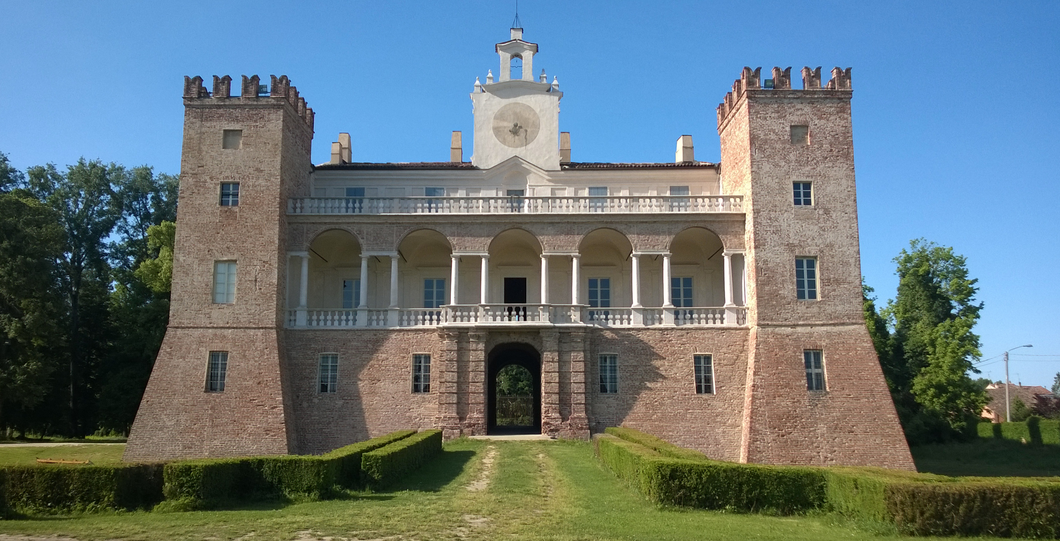 Villa Medici del Vascello restaurata e riaperta al pubblico da maggio 2014. Qui Visse Cecilia Gallerani